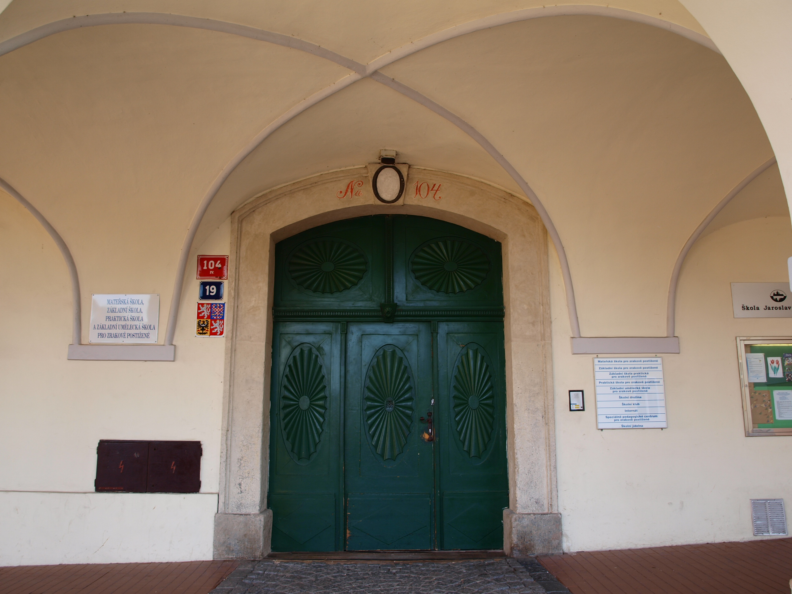 Vrbnovský palác, Hradčany